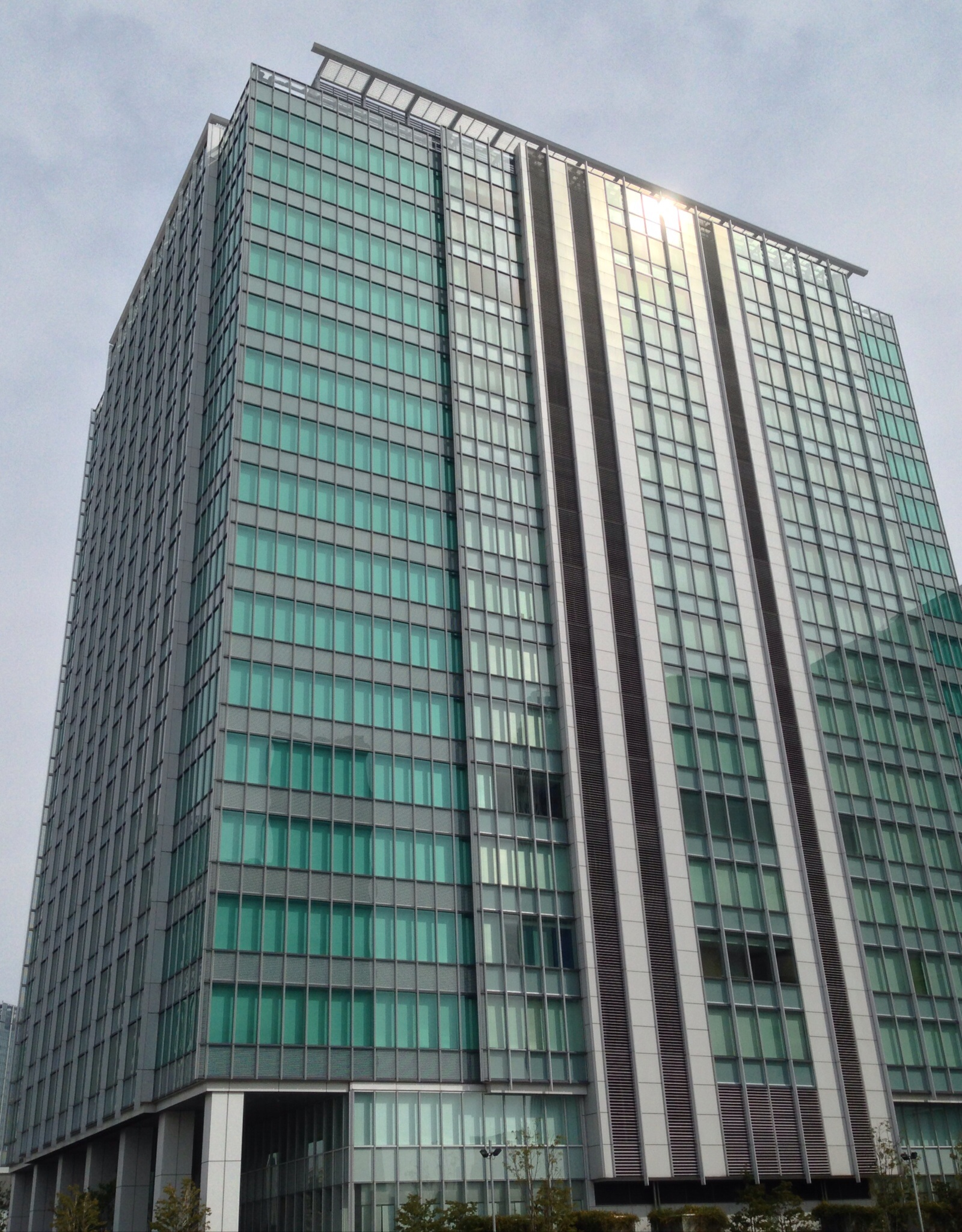 横浜みなとみらい地区（46街区）にあるオフィスビル「横浜ブルーアベニュー」。